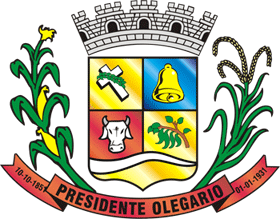 Brasão de armas do município de Presidente Olegário, MG., Brasil.